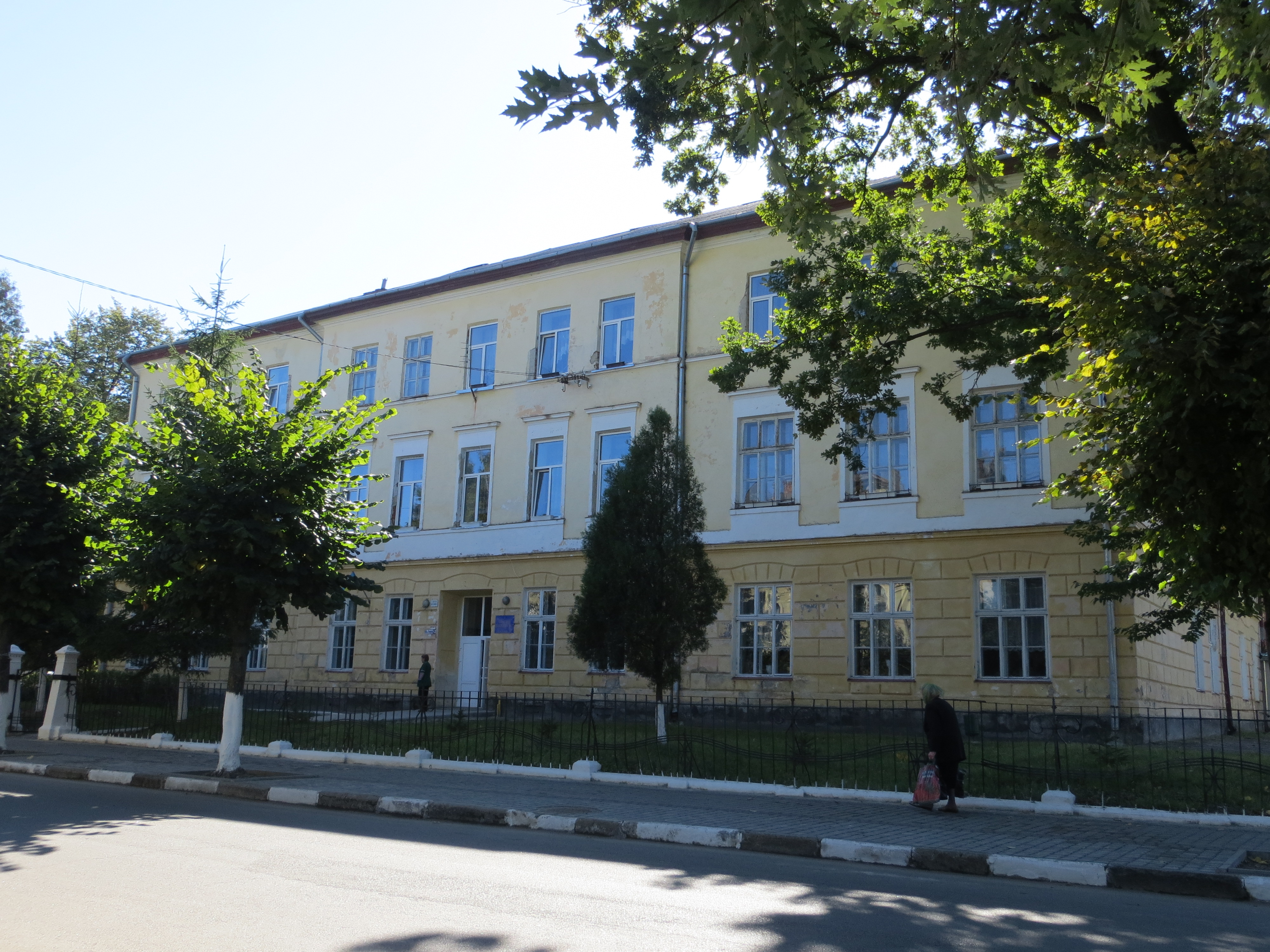 Школа (мур.), Самбір, вул. Коперніка,12